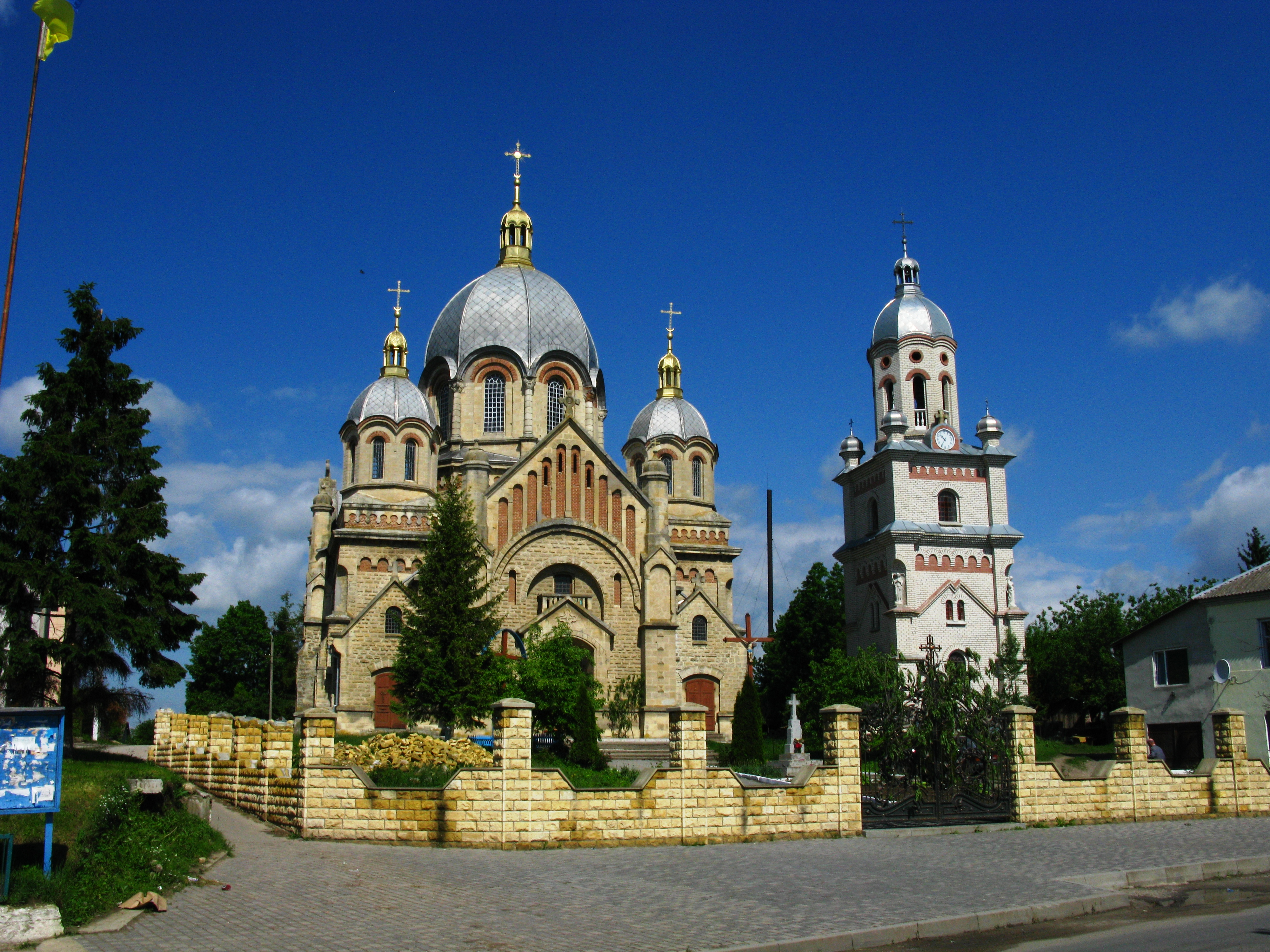 Церква Св.Михаїла, Товсте